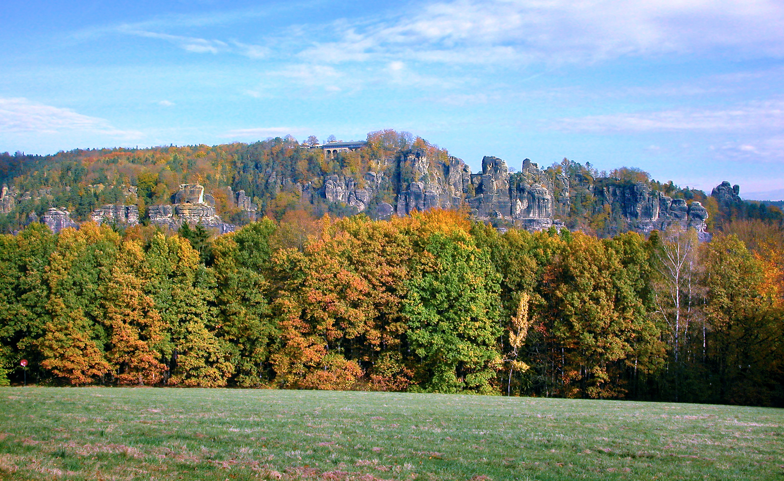 18.10.2008 Basteifelsen (zu 01847 Lohmen, oberhalb von Rathen): Sicht von der Laasenbank in Oberrahten zum Basteimassiv mit dem 1979 eröffneten Panoramarestaurant (GMP: 50.962432,14.070508). Zu sehen ist auch die Basteibrücke (GMP: 50.961774,14.072637). Rechts von ihr liegt die Felsenburg Neurahten. [DSCN34689.TIF]20081018010DR.JPG(c)Blobelt